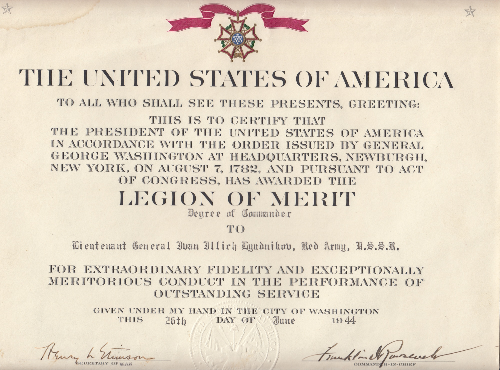 Legion of Merit by I.I.Lyudnikov